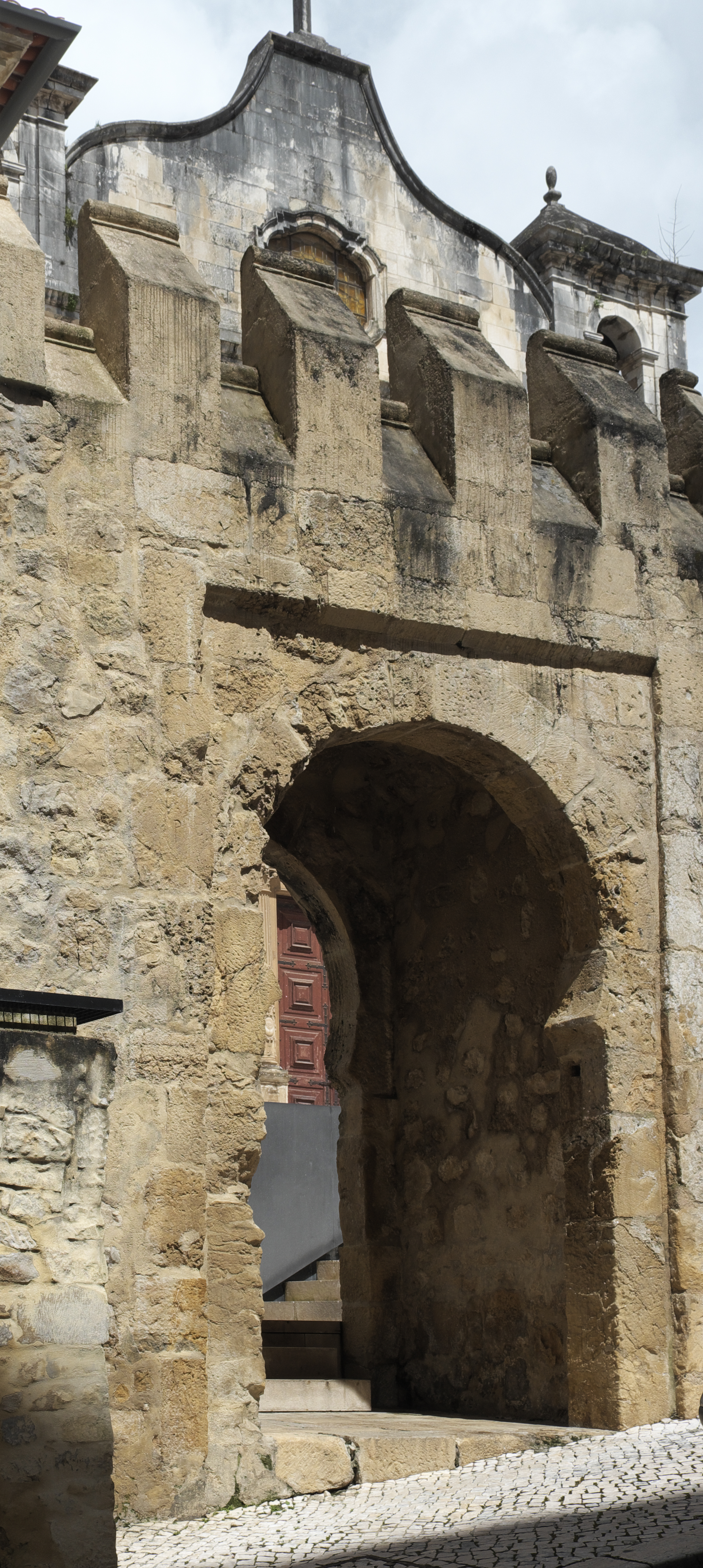 Porta Moçárabe in Coimbra (Portugal)